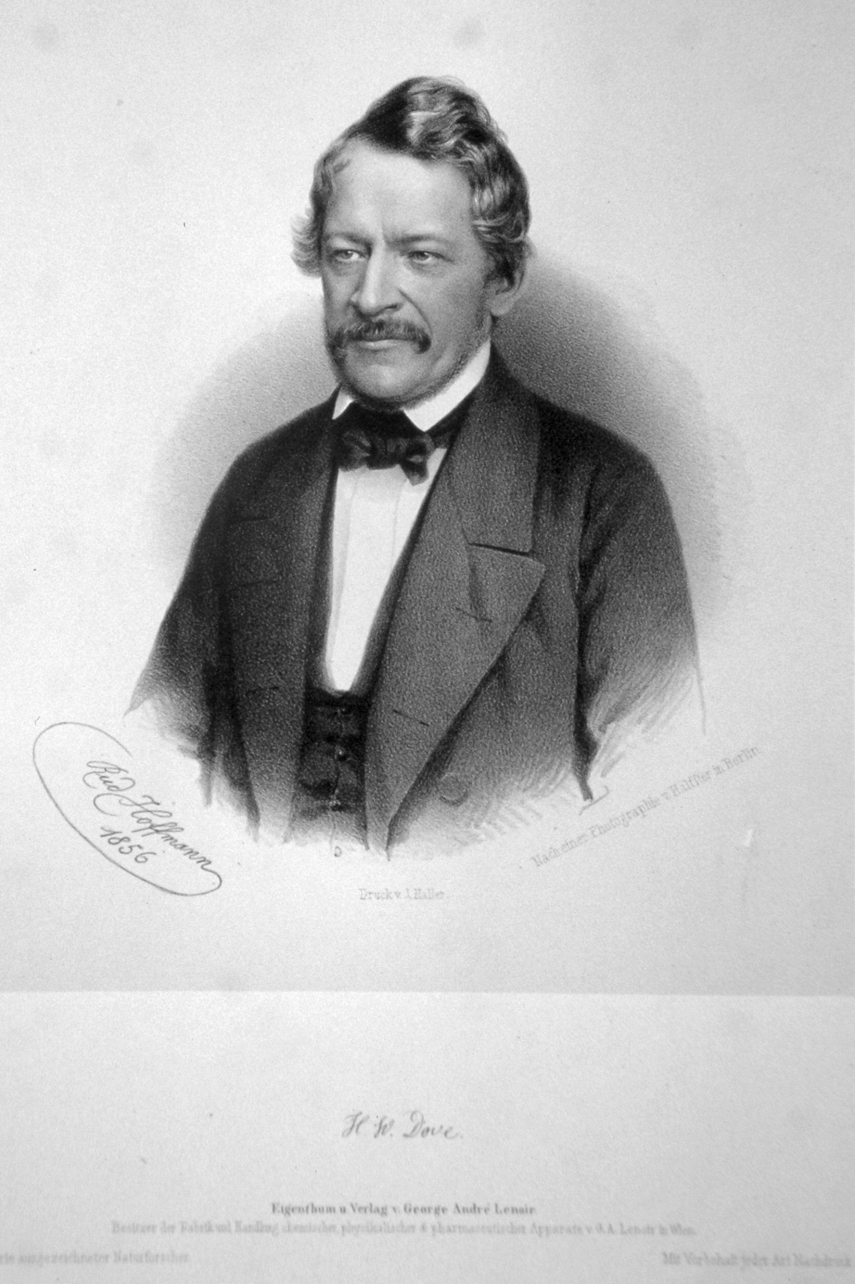 Heinrich Wilhelm Dove (1803-1879), deutscher Physiker. Lithographie von Rudolf Hoffmann, 1856, nach einer Photographie von Halffter